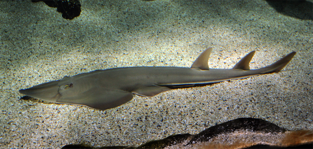 Rhinobatos rhinobatos